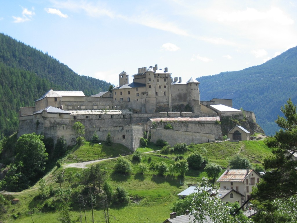 Die Burg Queras in Château-Ville-Vieille, Hautes-Alpes, Frankreich